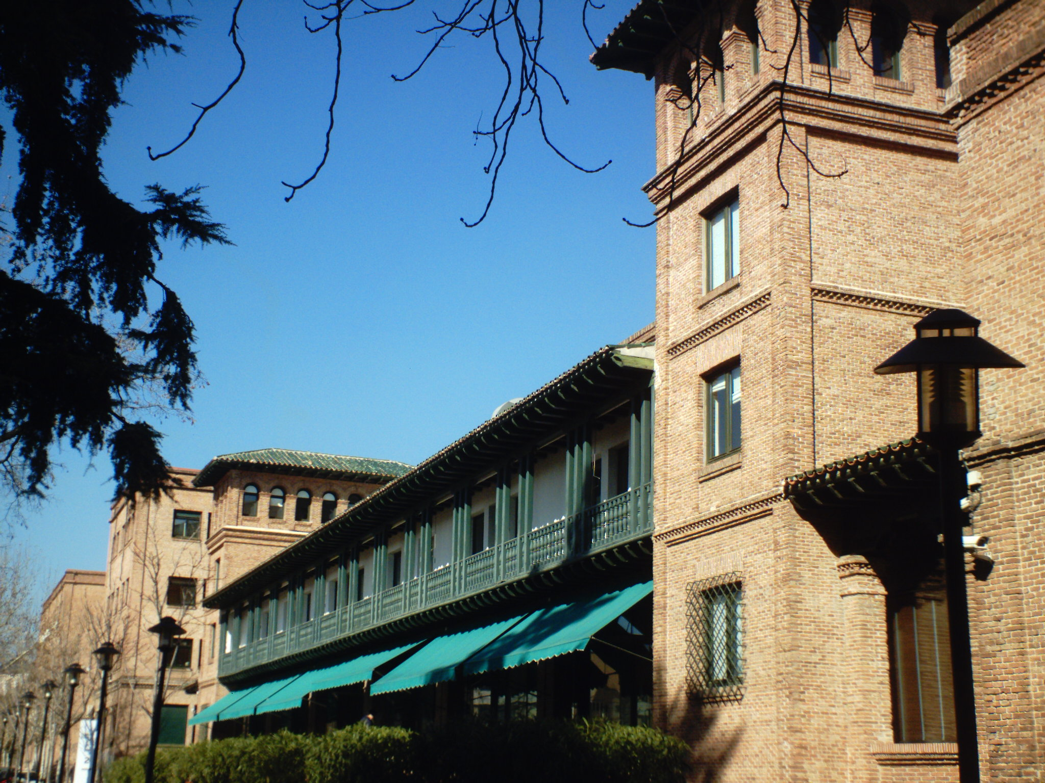 Pabellón Transtlántico de la Residencia de Estudiantes, en Madrid, España.